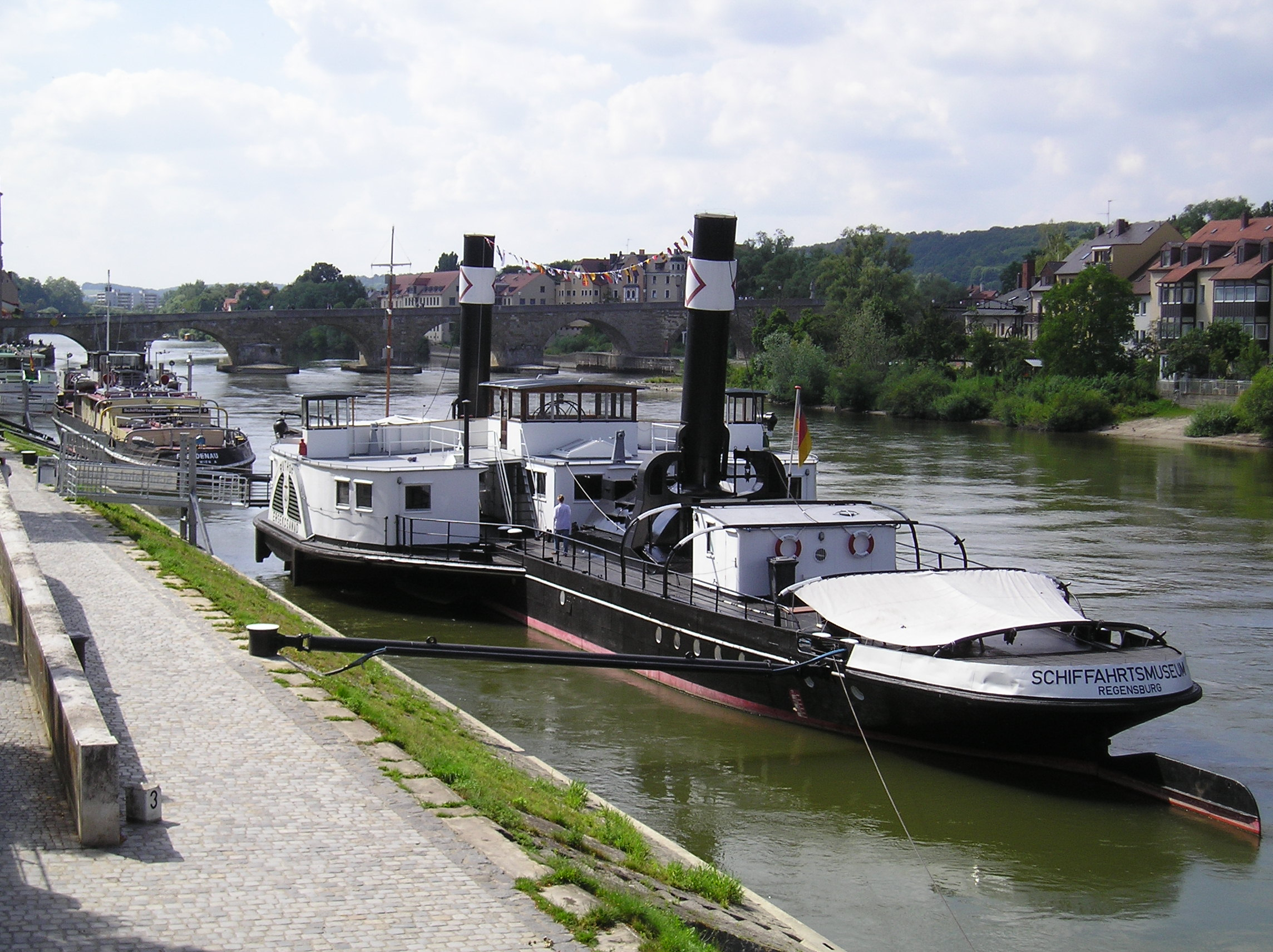 Schiffahrtsmuseum Regensburg